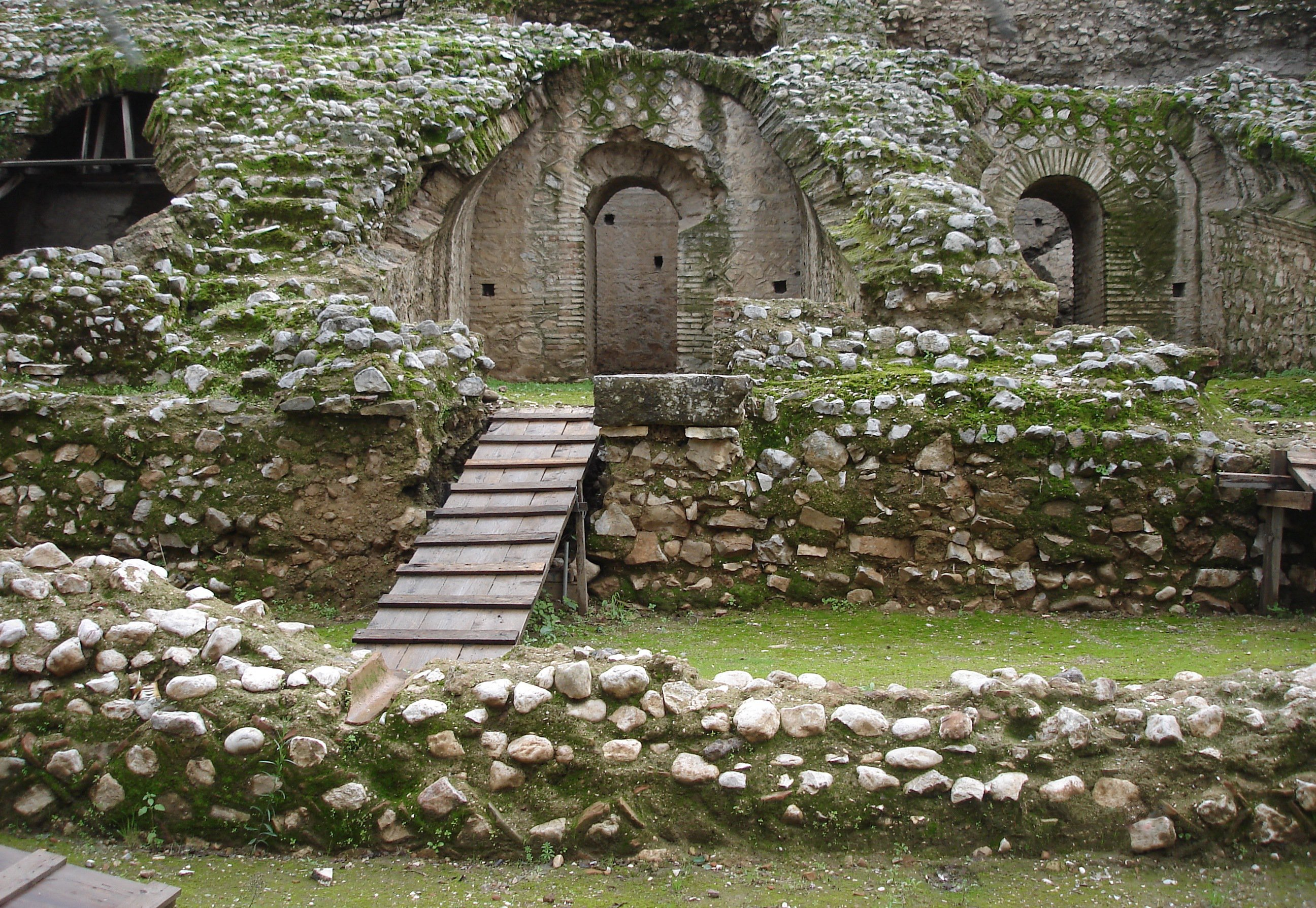 Ancient theatre - stadium Patras Achaia, GreeceΑρχαίο θέατρο στάδιο της Πάτρας